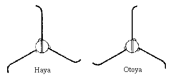 Ya - Haya et Otoaya